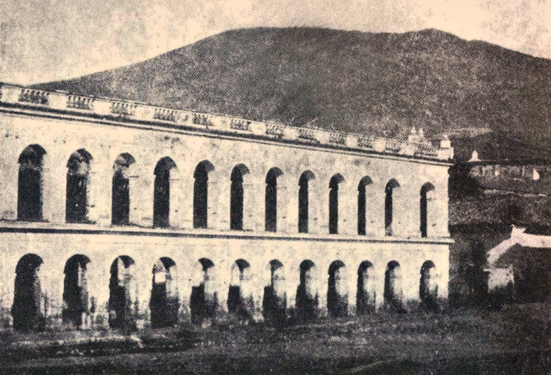 Edificio del Mercado de las Carnicerías de Quito, que se levantaba donde hoy se encuentra el Teatro Nacional Sucre. Fotografía sobre papel, autor desconocido, alrededor de 1875.